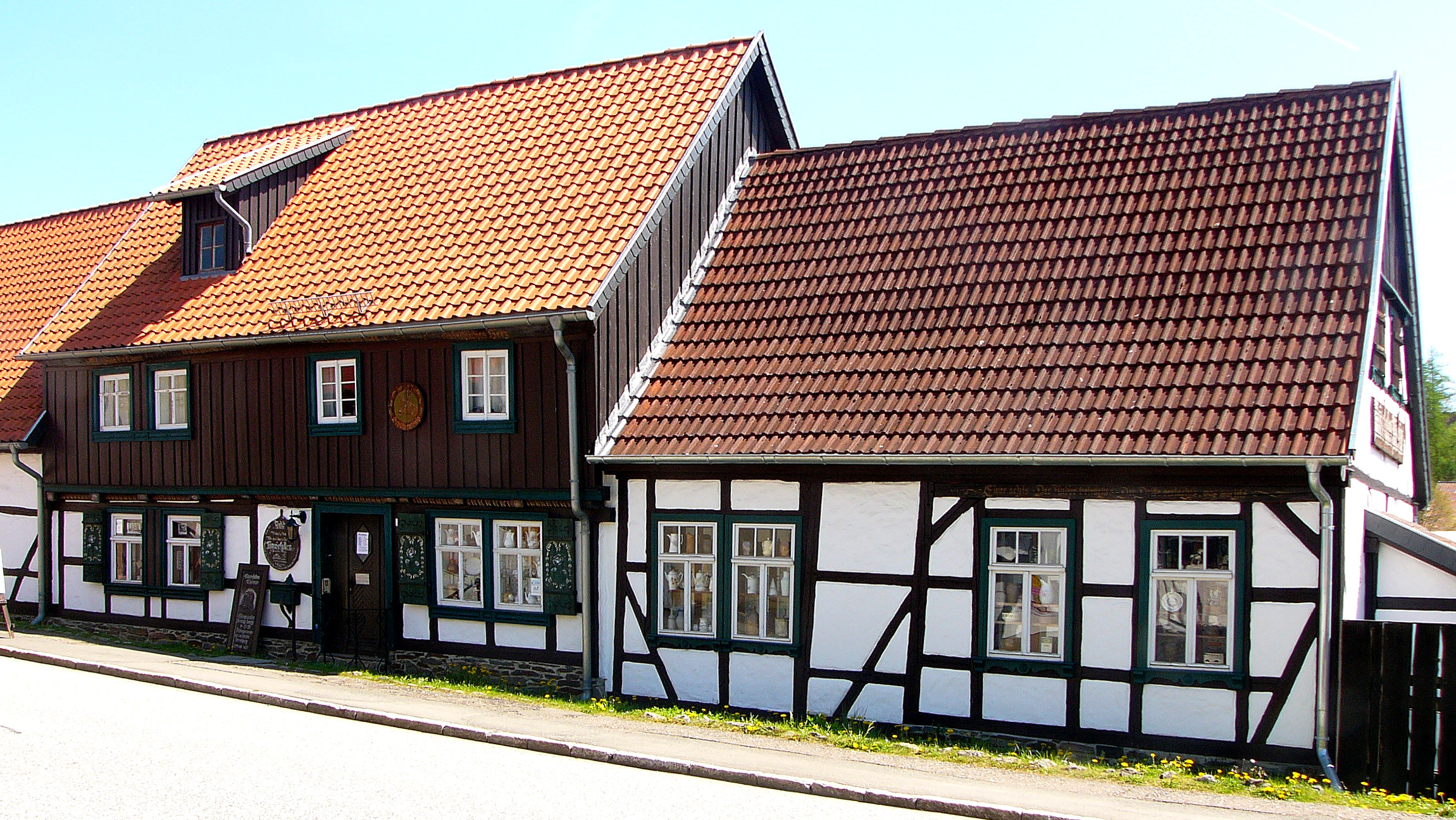 Ackerbürgerhof; Wohnhaus mit Füllhölzern und Balkenköpfen, im 18. Jhd. durch zwei seitliche Wirtschaftsgebäude erweitert, im 19. Jhd. Wohnhaus umfassend erneuert, 2. Hälfte 17. Jhd.; Denkmalnr.: 094 84958.